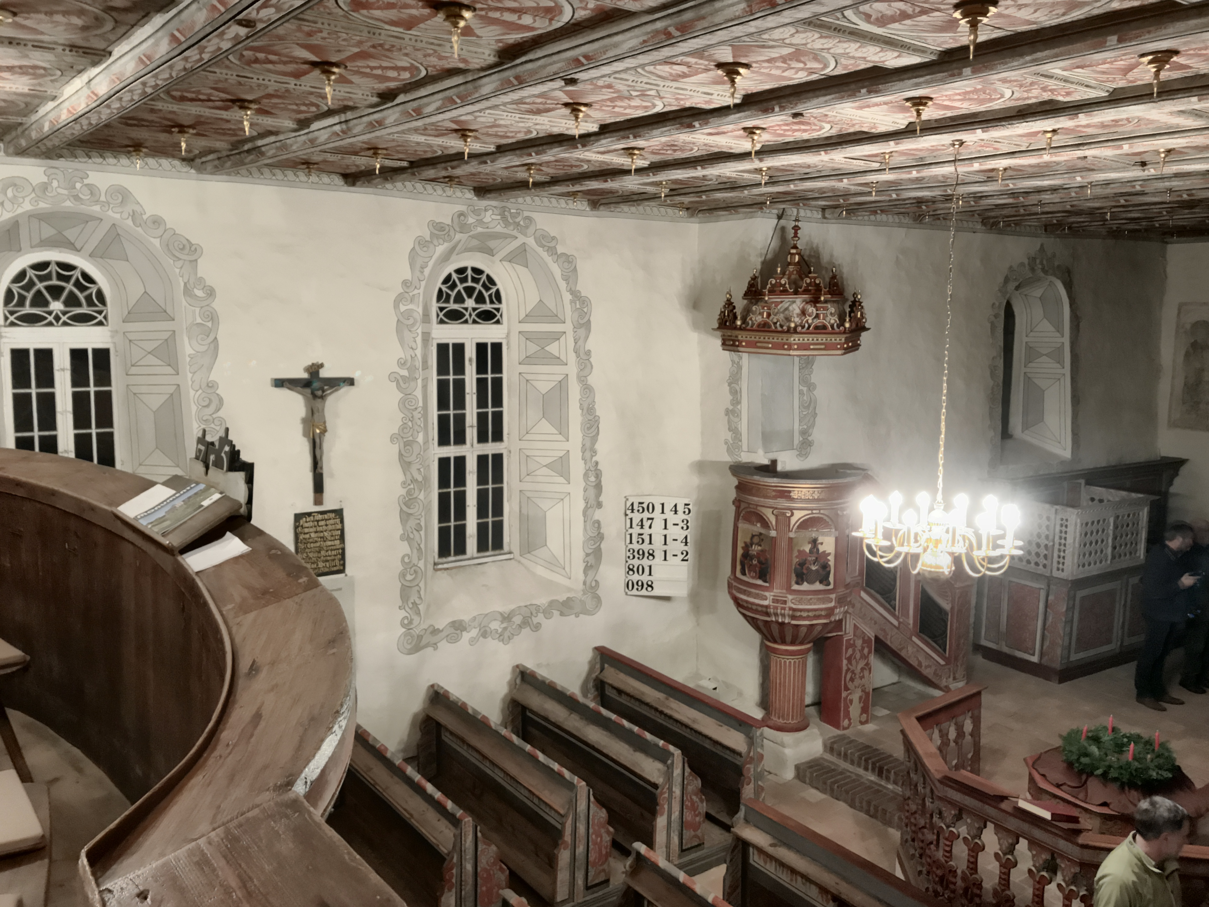 Dorfkirche Blochwitz links